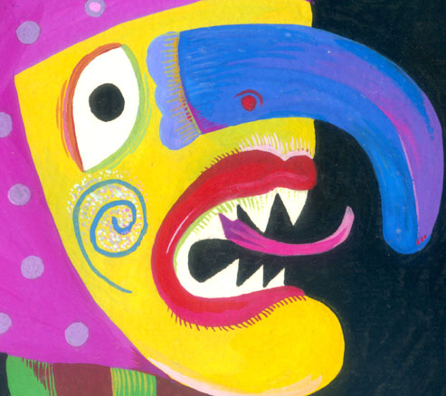 Keresztes Dóra: Holdasfilm (festmény)